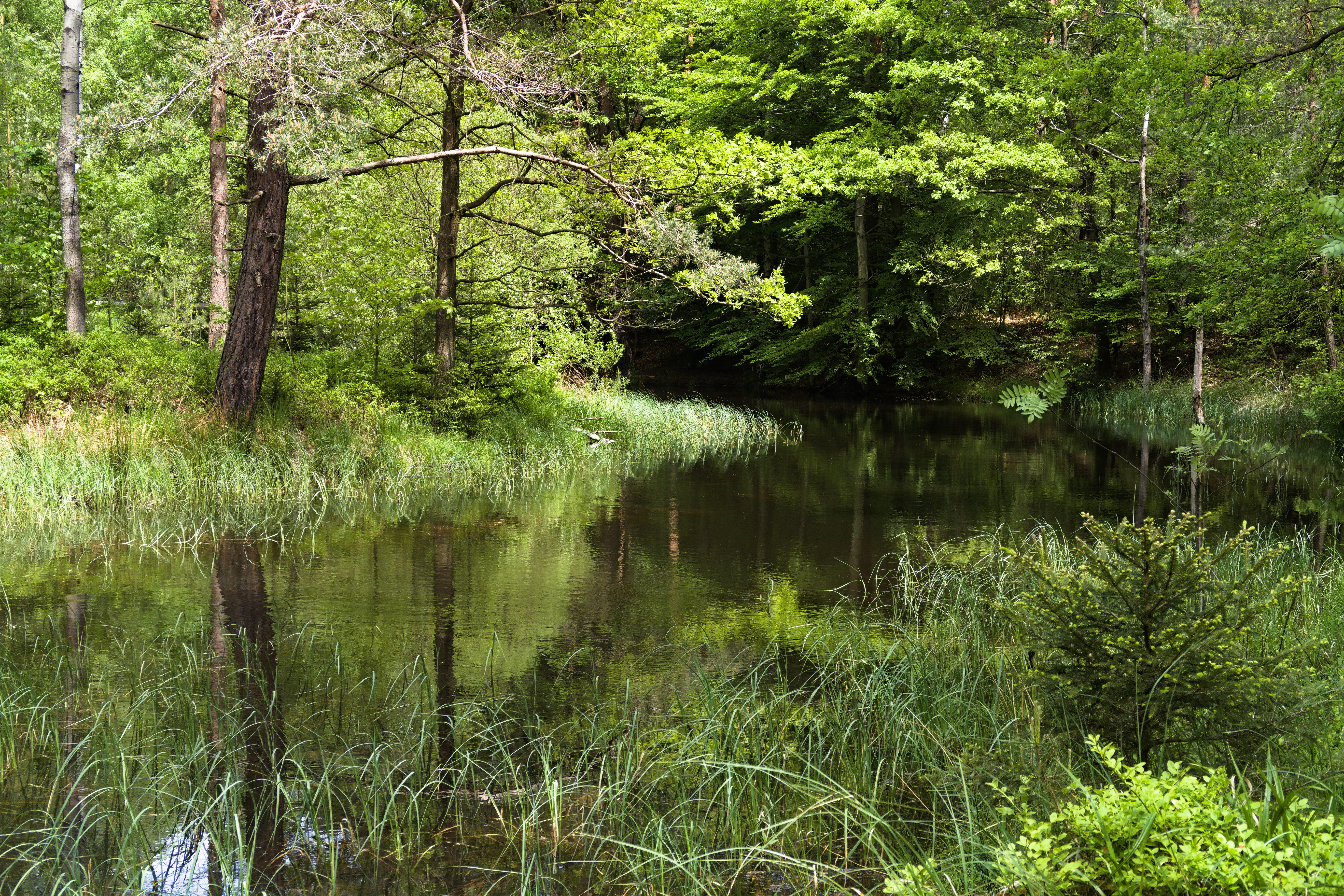 Naturdenkmal Böses Loch in der Dresdner Heide